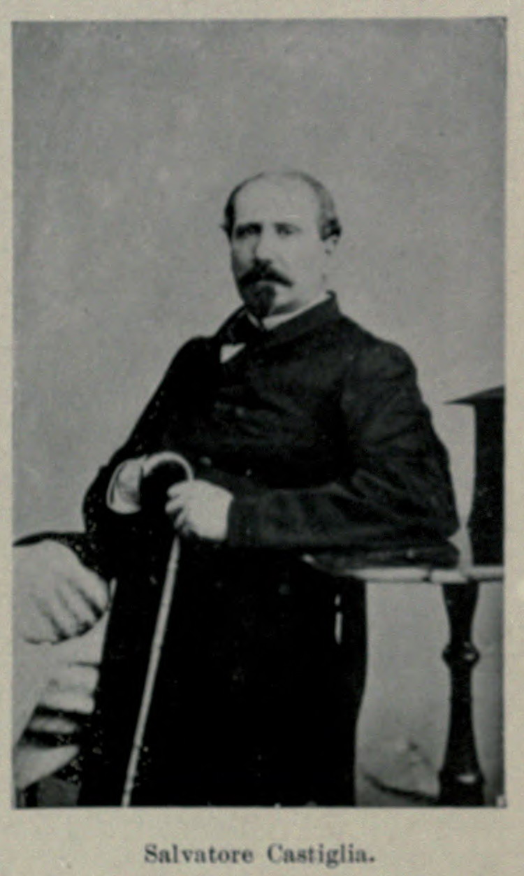 Foto di Salvatore Castiglia.